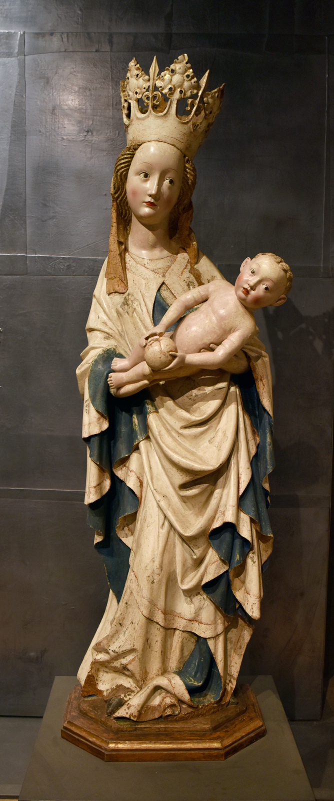 Františkánská madona (kolem 1415), Národní galerie v Praze